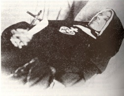 Corps de la défunte Elizabeth Prout, alias Mère Marie-Joseph de Jésus, morte le 11 janvier 1864, à l'âge de 43 ans.